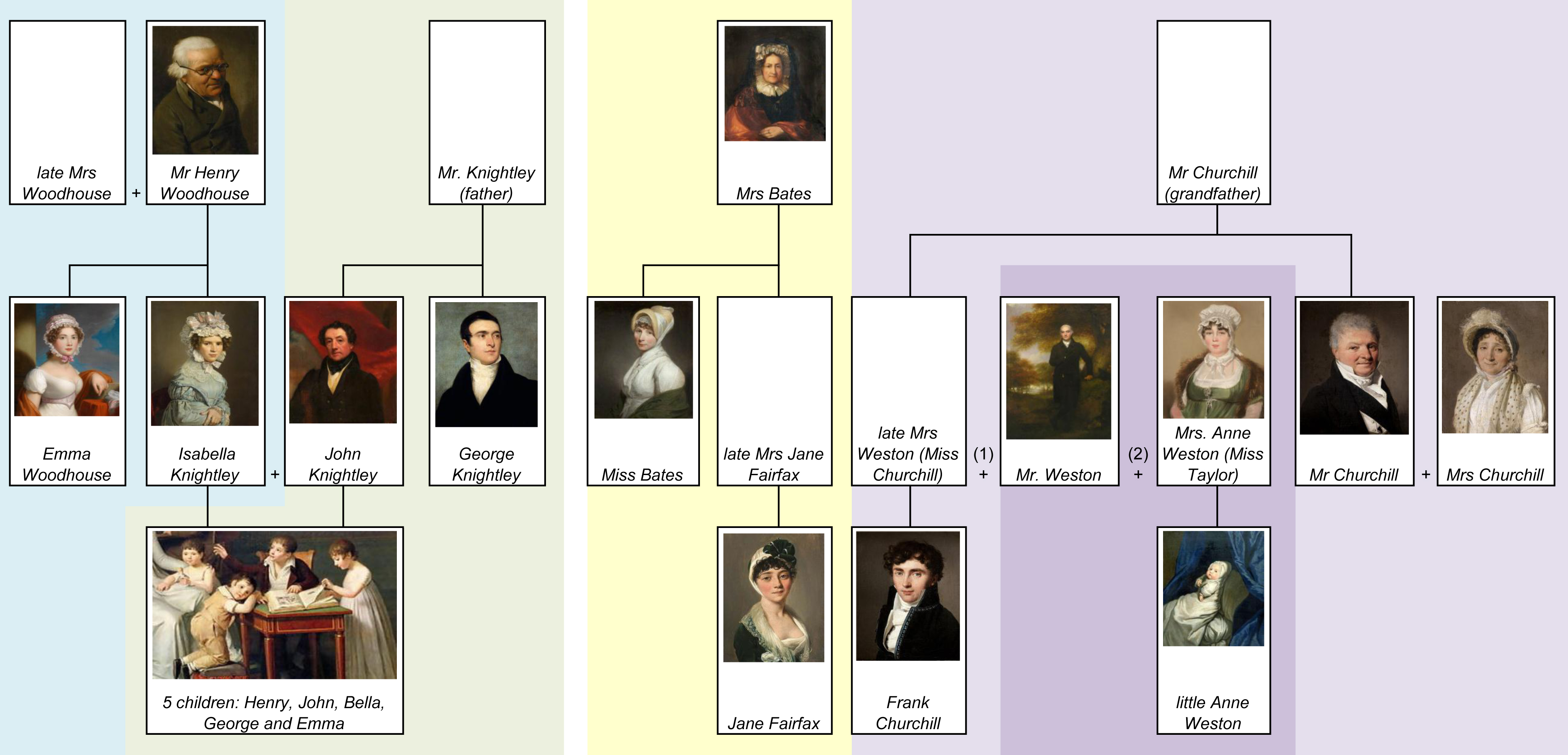 Генеалогическое древо, "Эмма", Джейн Остин